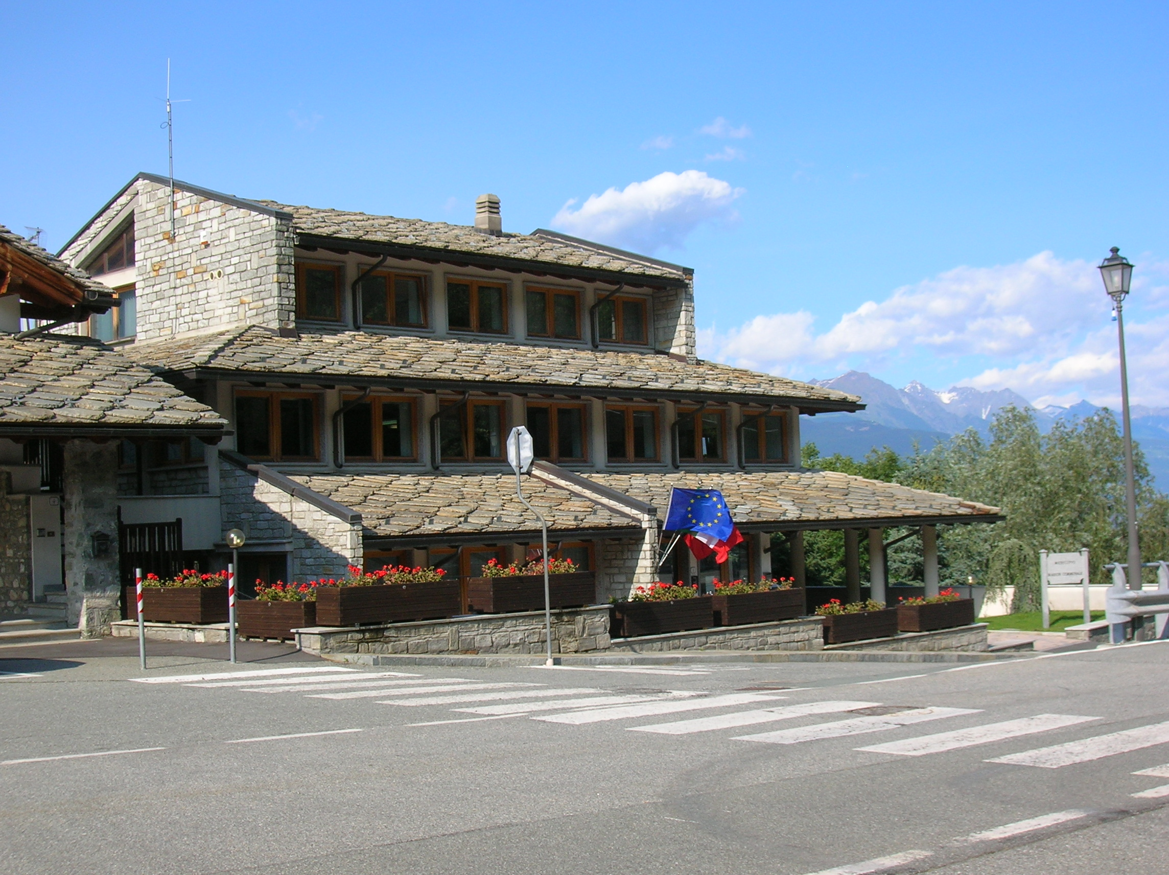 Municipio di Brissogne, Valle d'Aosta, Italia.